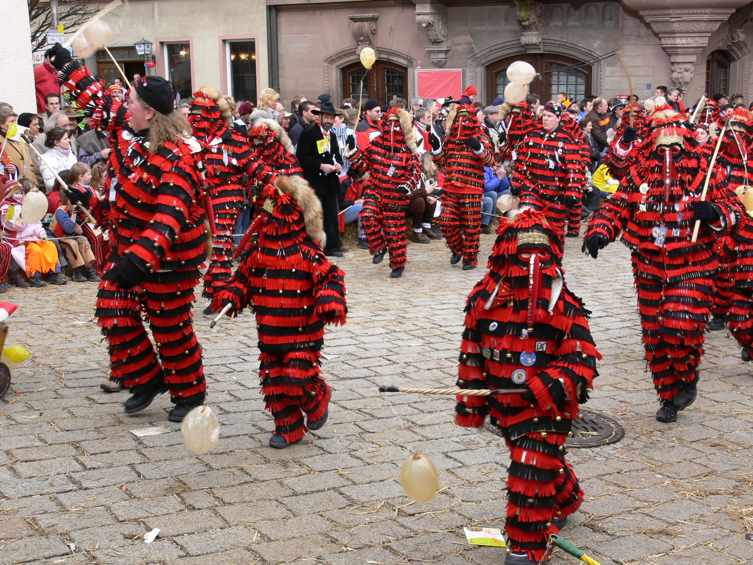 Narrenzunft Engen, Figur: Hansele Veranstaltung: Narrensprung beim Narrentreffen Meßkirch 2006